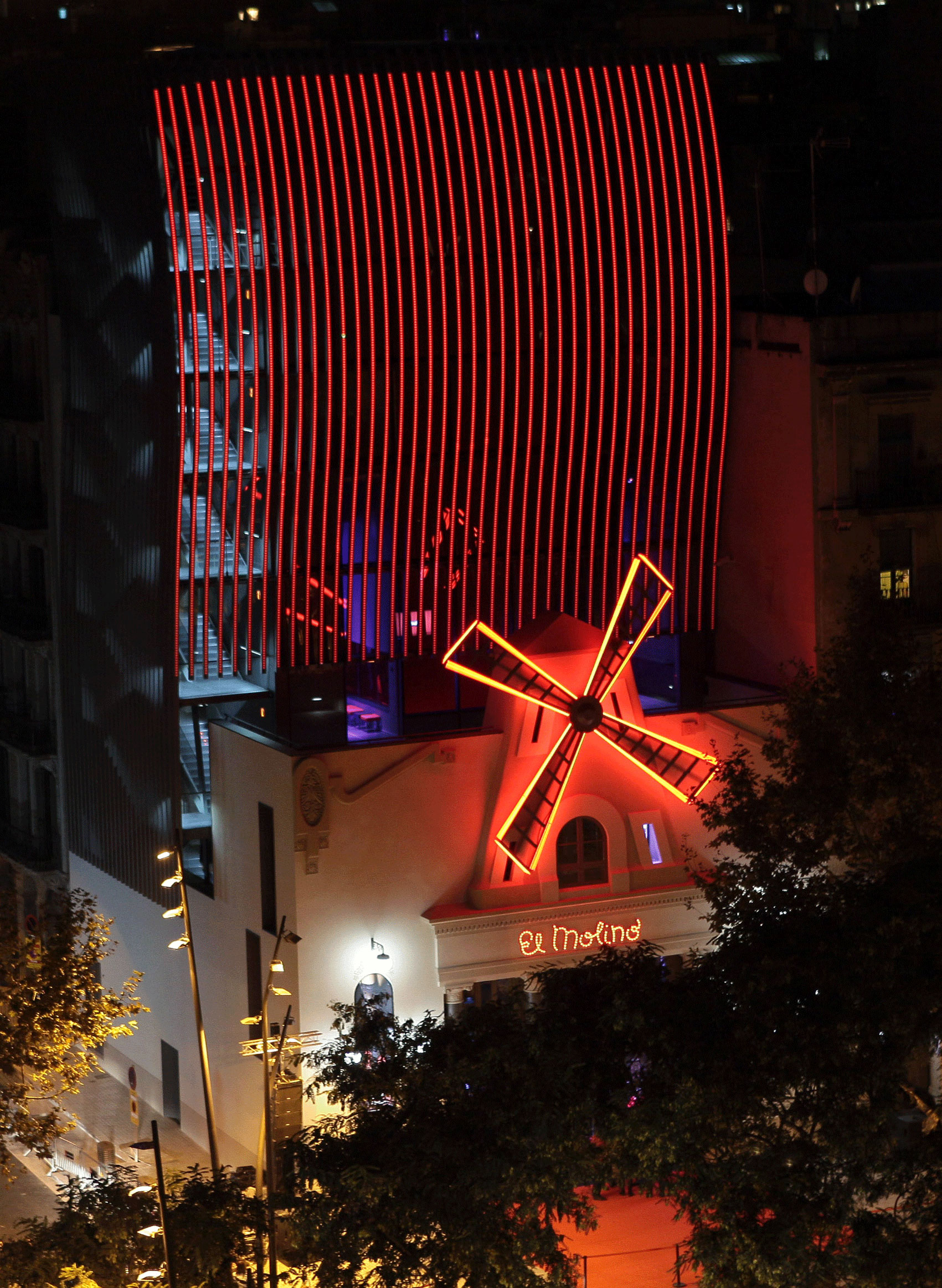 Vistas de El Molino en el Paralelo